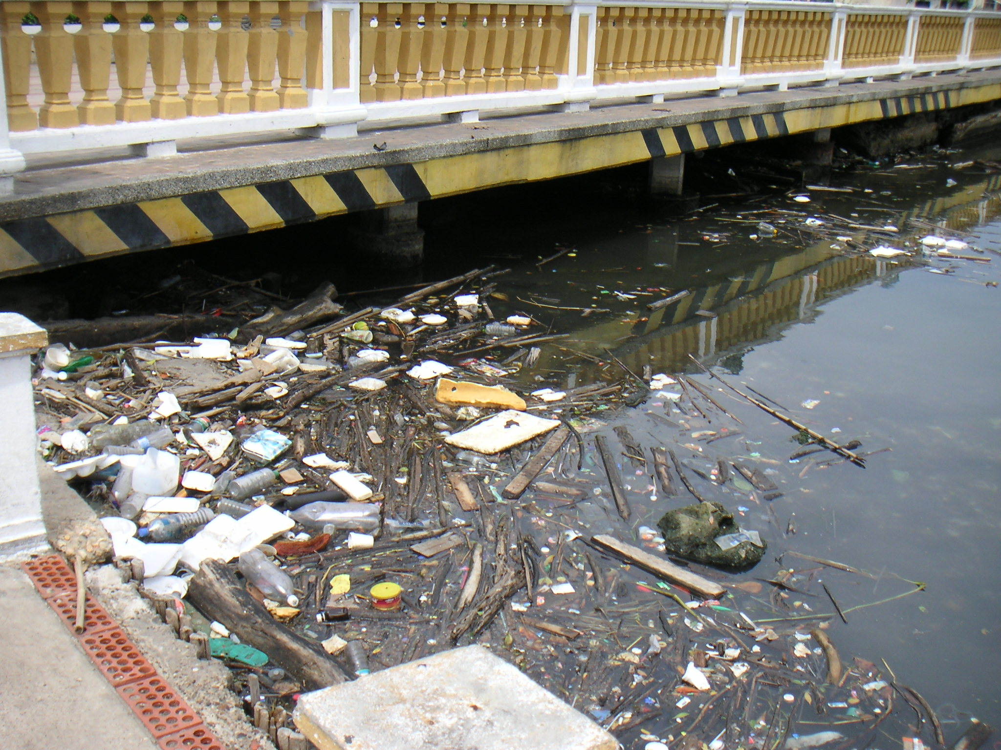 Müll im Wasser, Cartagena, Kolumbien Source: Louise Wolff (darina), June 2005